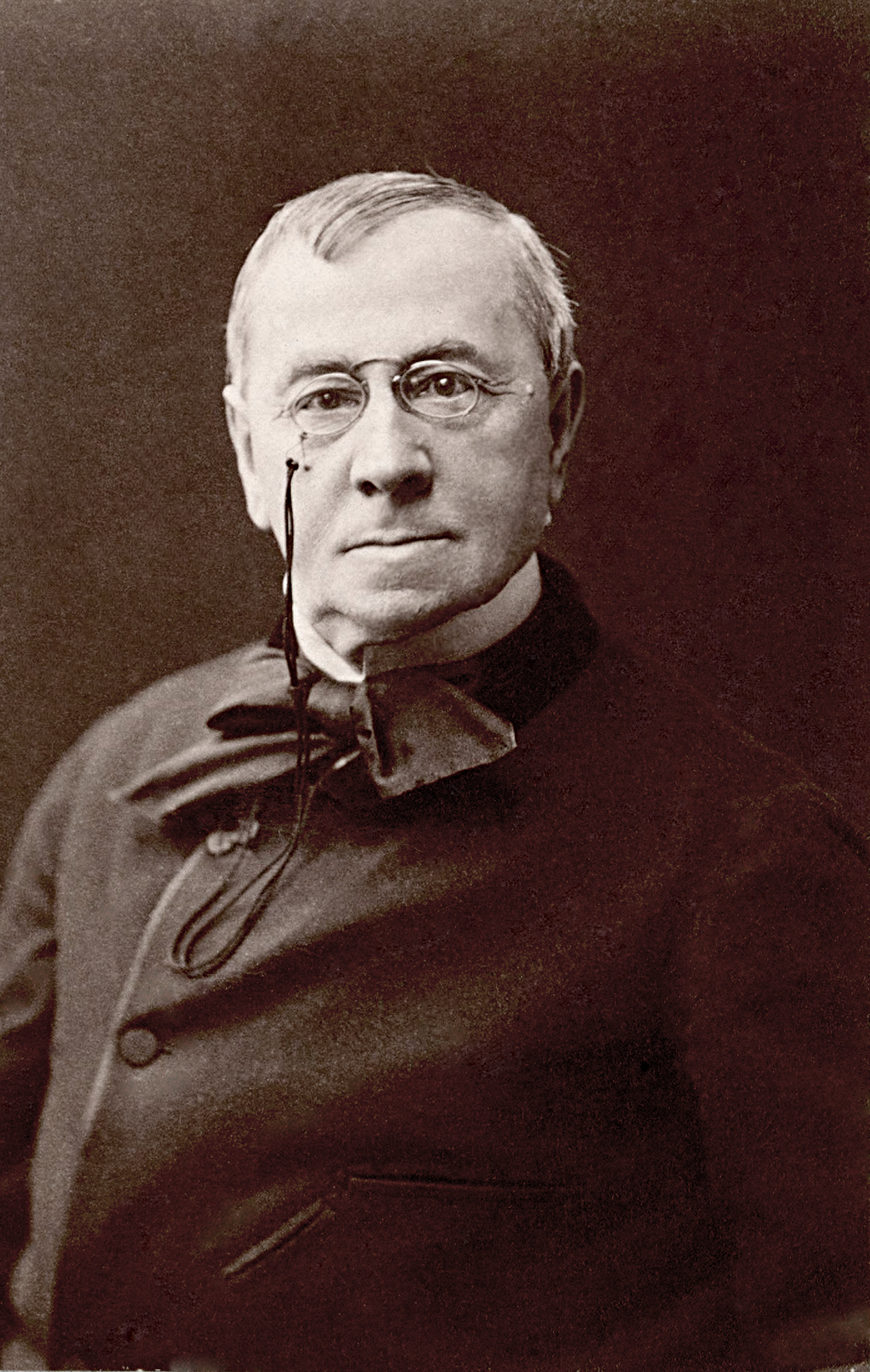 Émile de Girardin (1802-1881), journaliste et politicien français